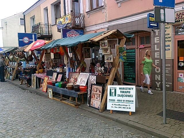 Ryki, Weekend z LRY 2012, 26 sierpień 2012